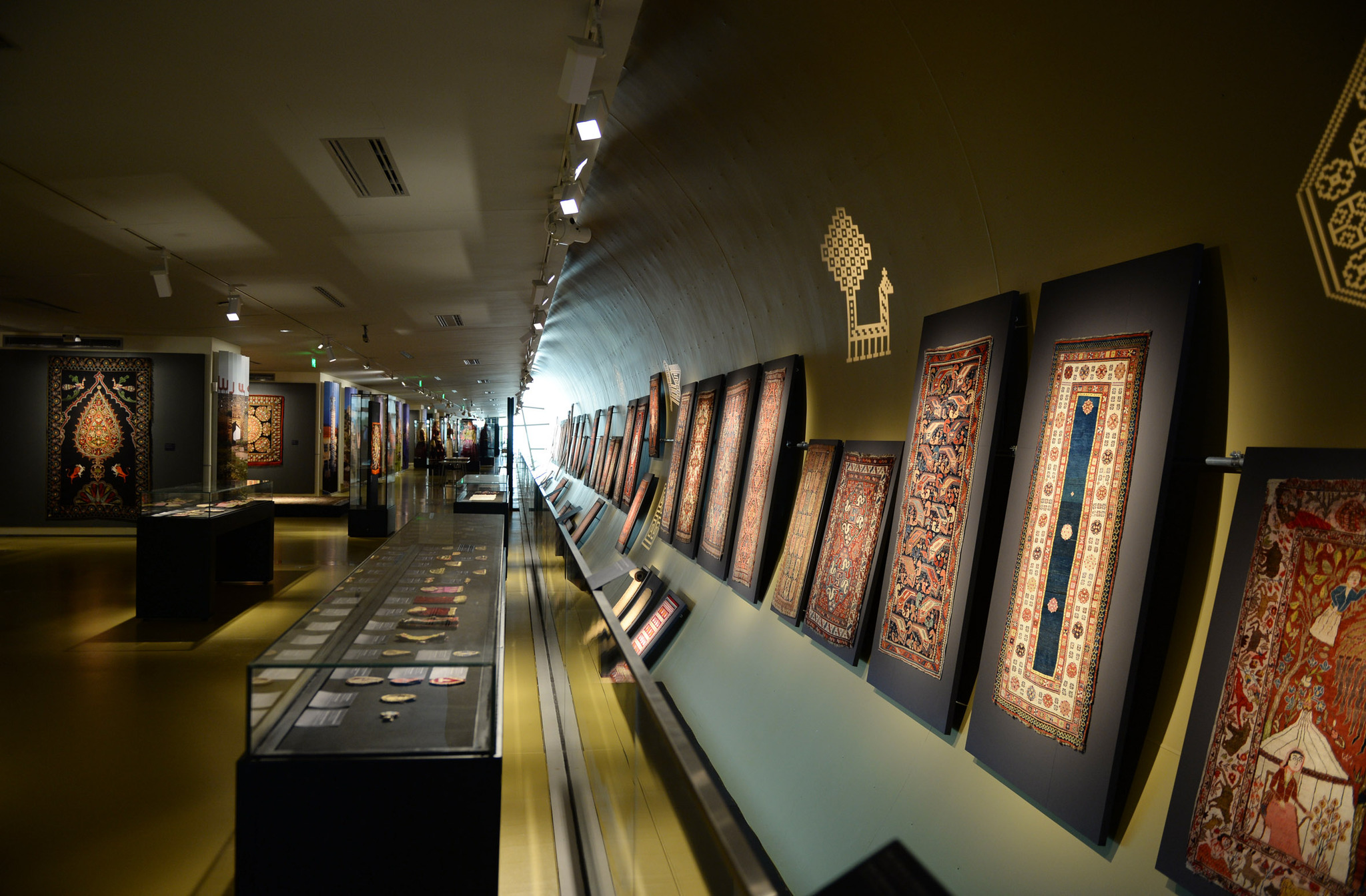 Azərbaycan xalça muzeyi